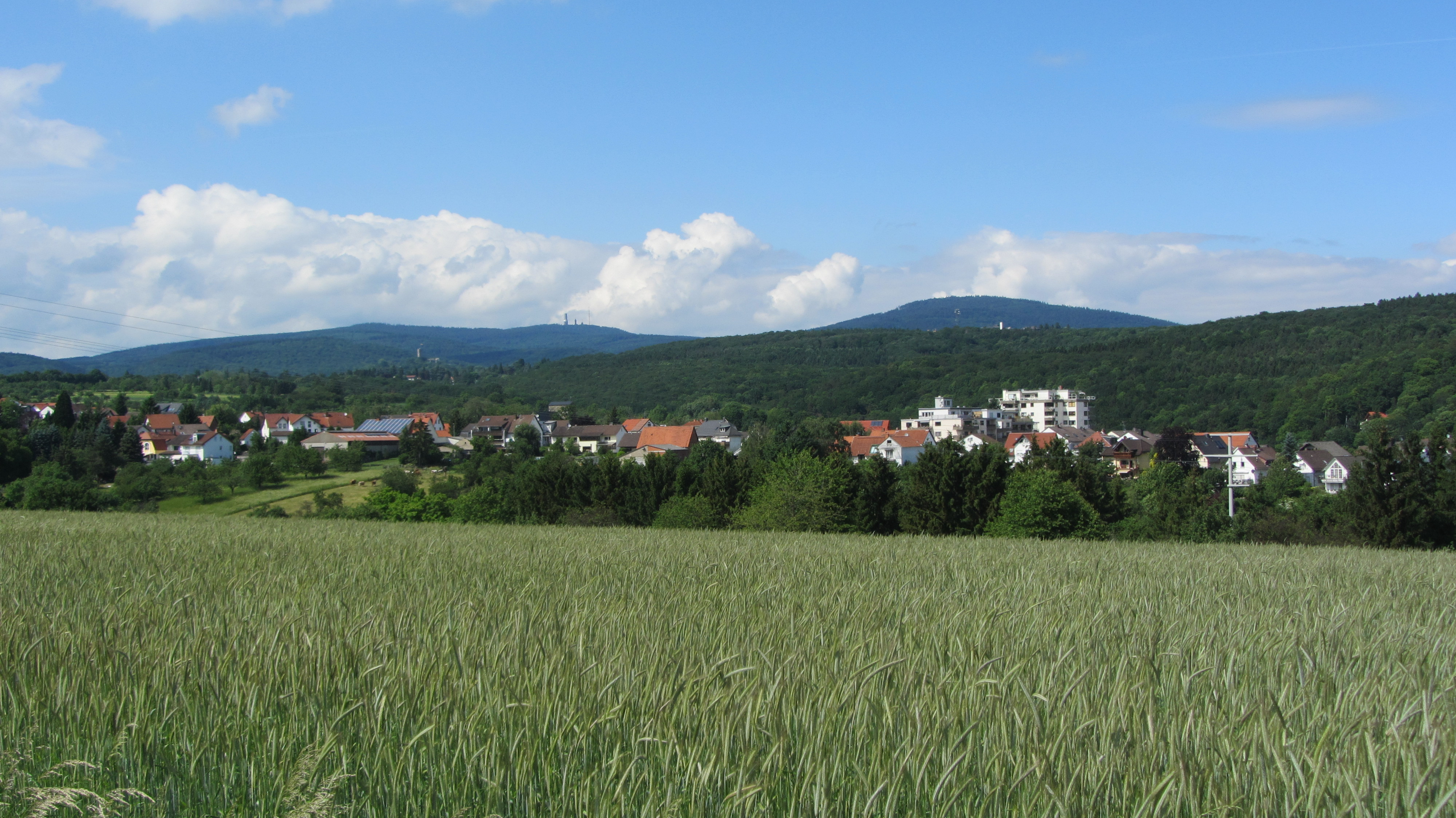 Panorama des Bad Sodener Stadtteil Altenhain